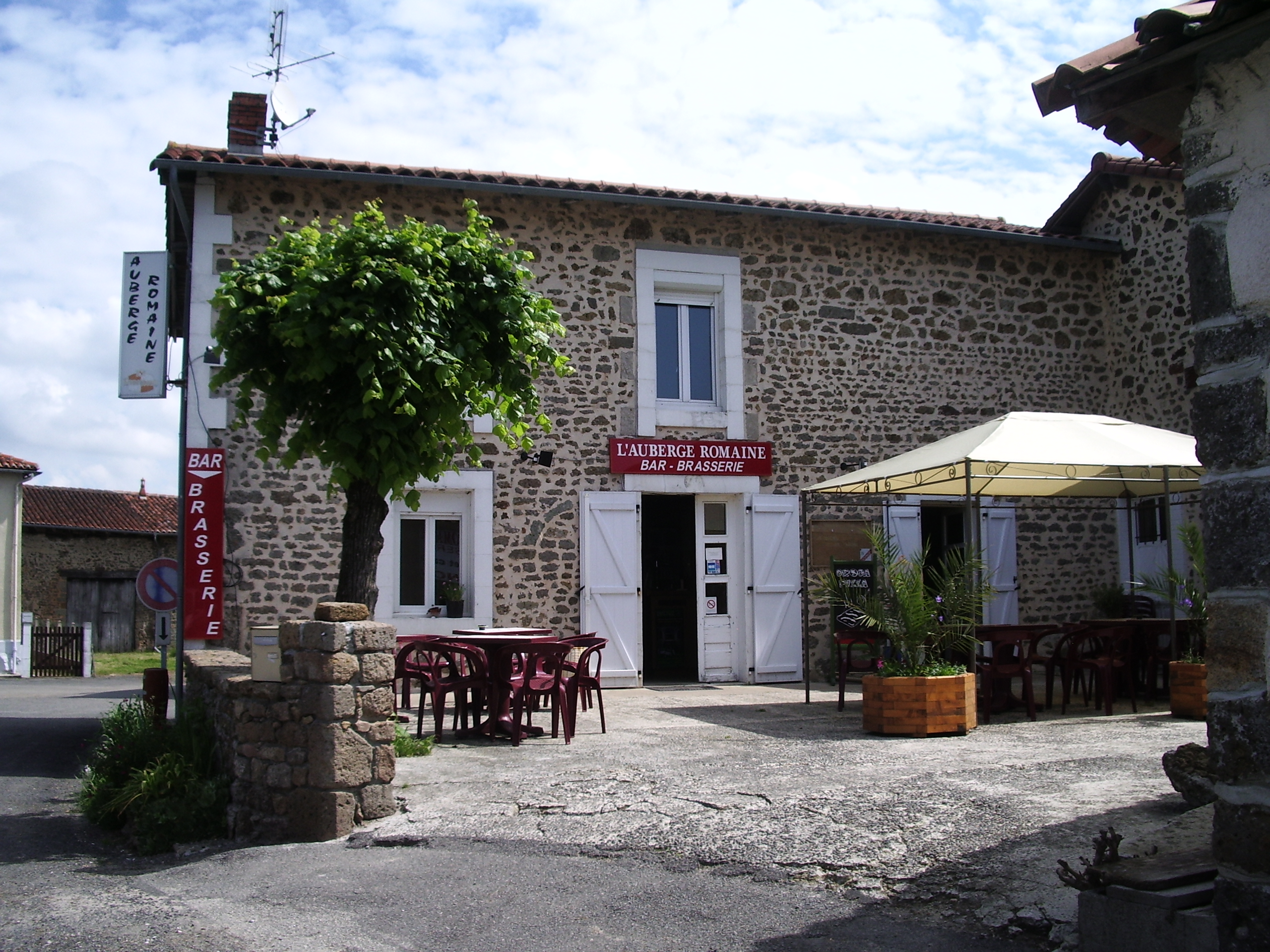 Auberge romaine à Chassenon (Charente, France)